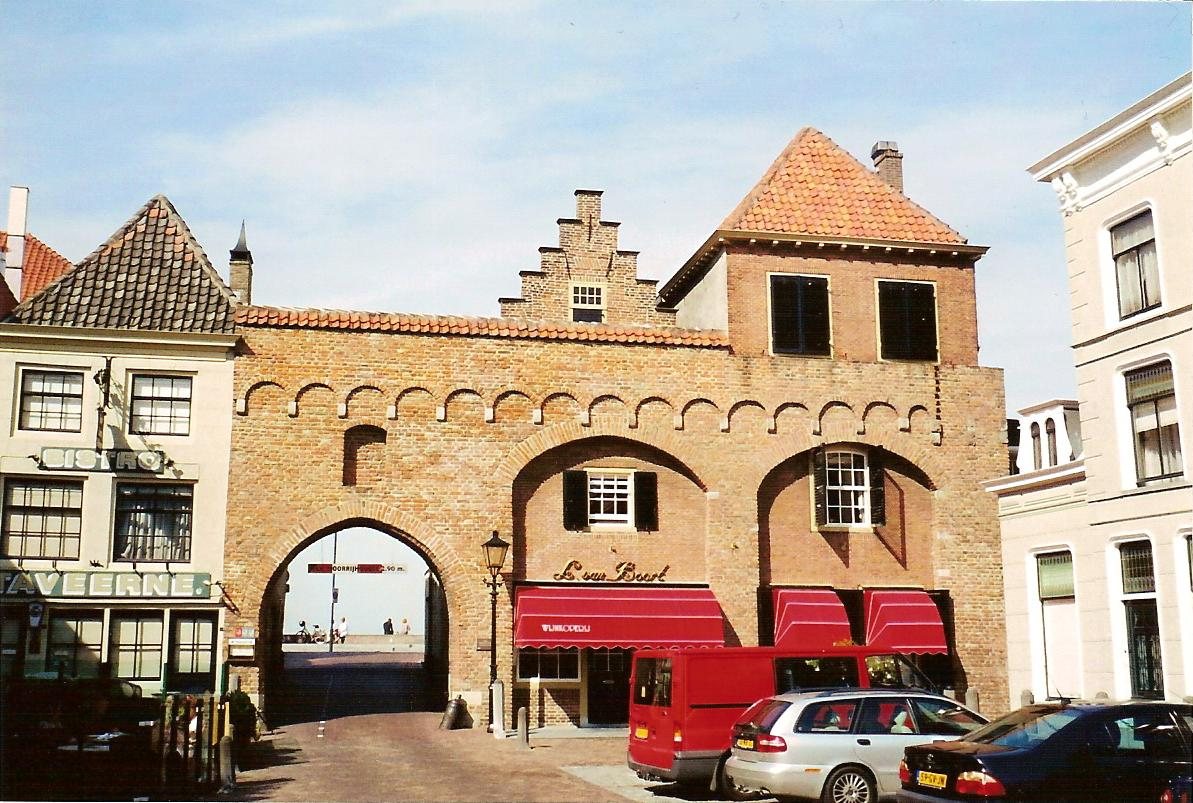 eigen foto